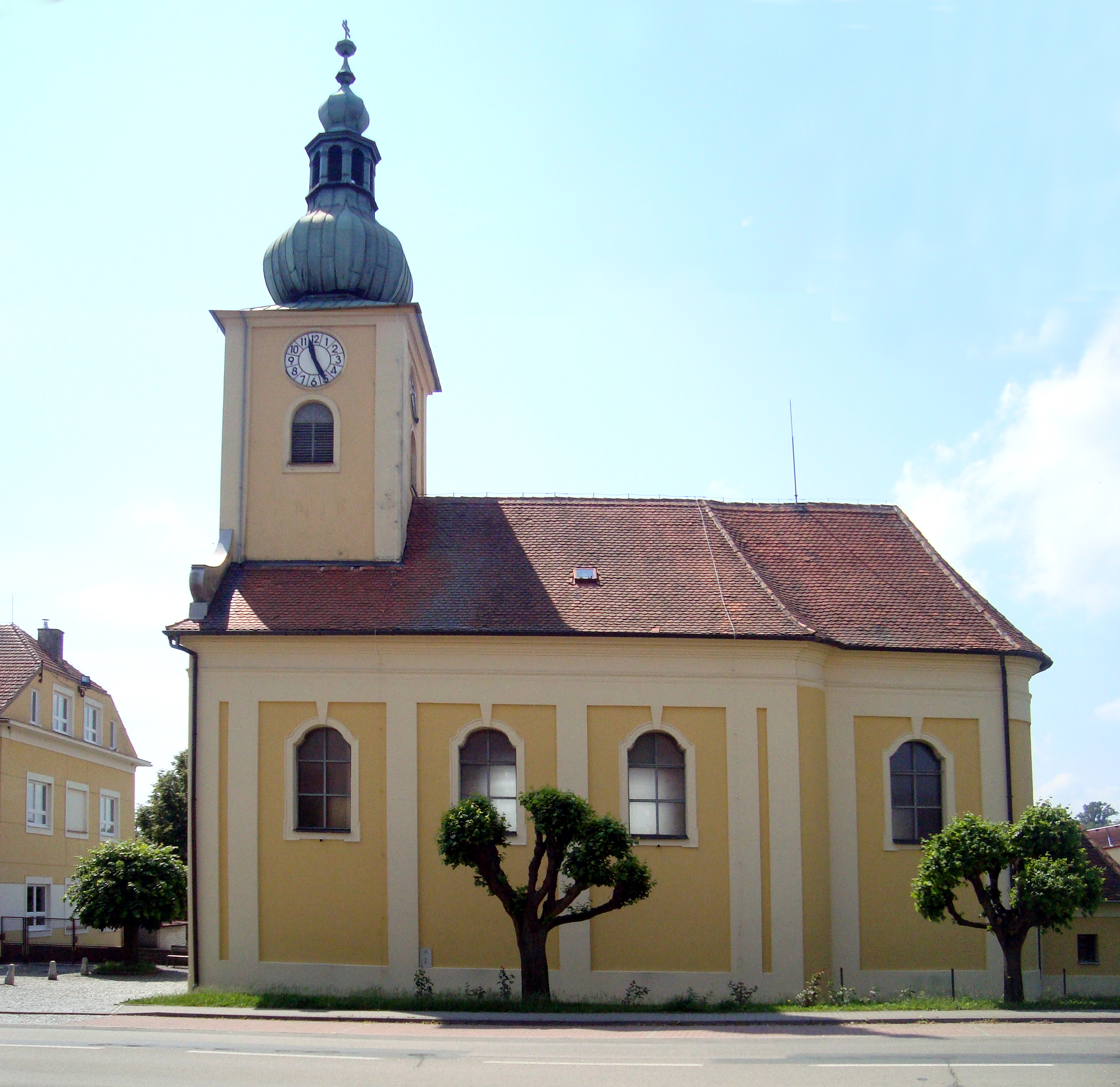 Chrám svatých Petra a Pavla v Říčanech